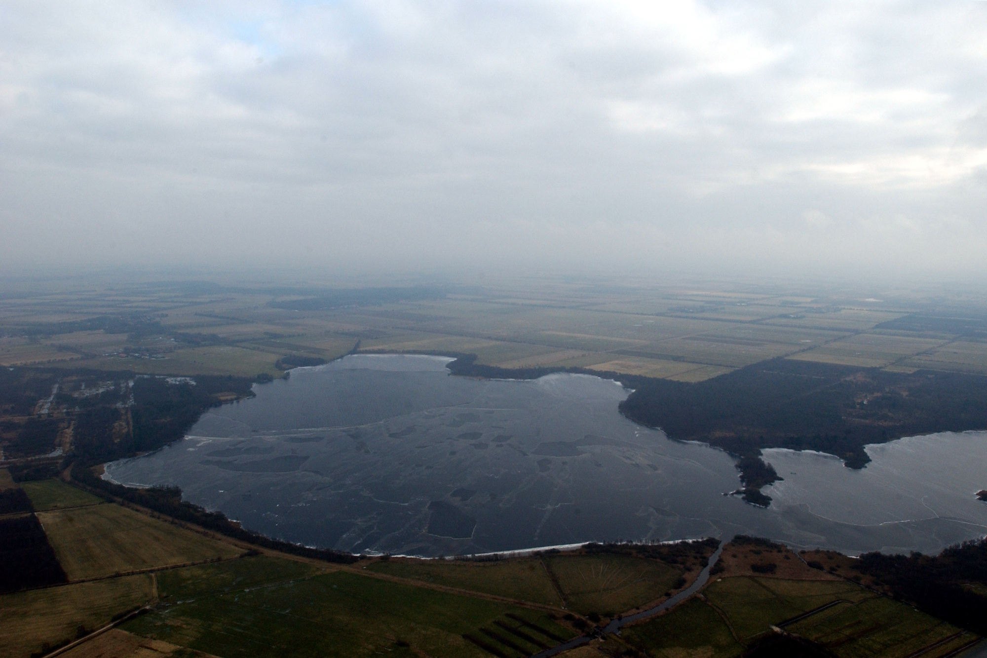 Fotoflugkurs Cuxhaven 2013: Dahlemer See, Halemer See